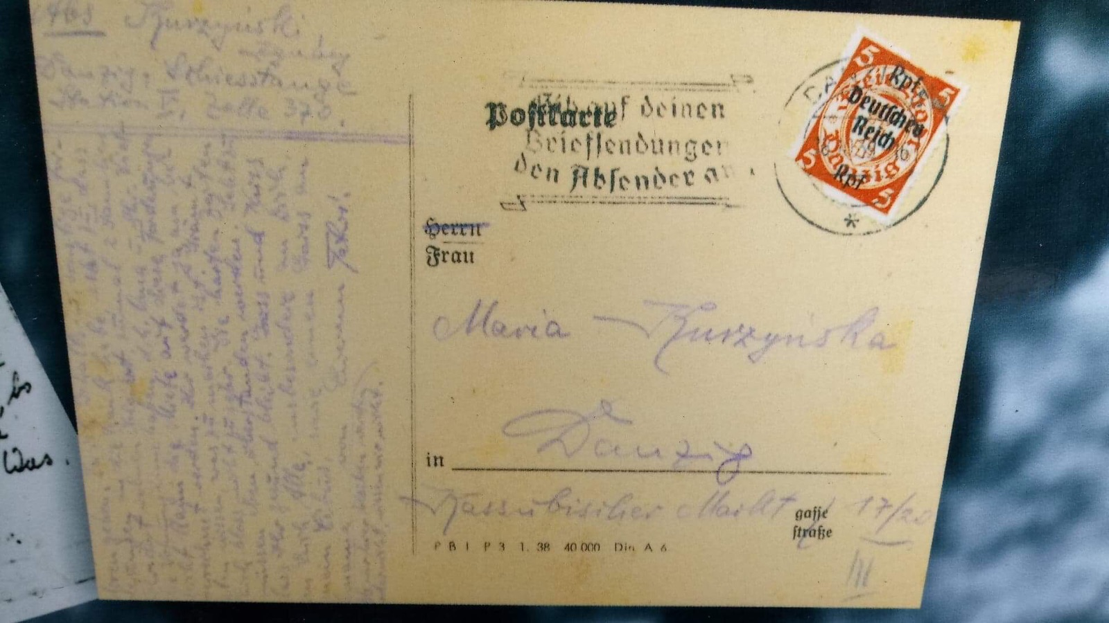 Kartka pisana z więzienia niemieckiego w 10-18-1939 do żony Marii Kurzyńskiej wystawiona w muzeum w Piaśnicy. Kartka nigdy nie została dostarczona.